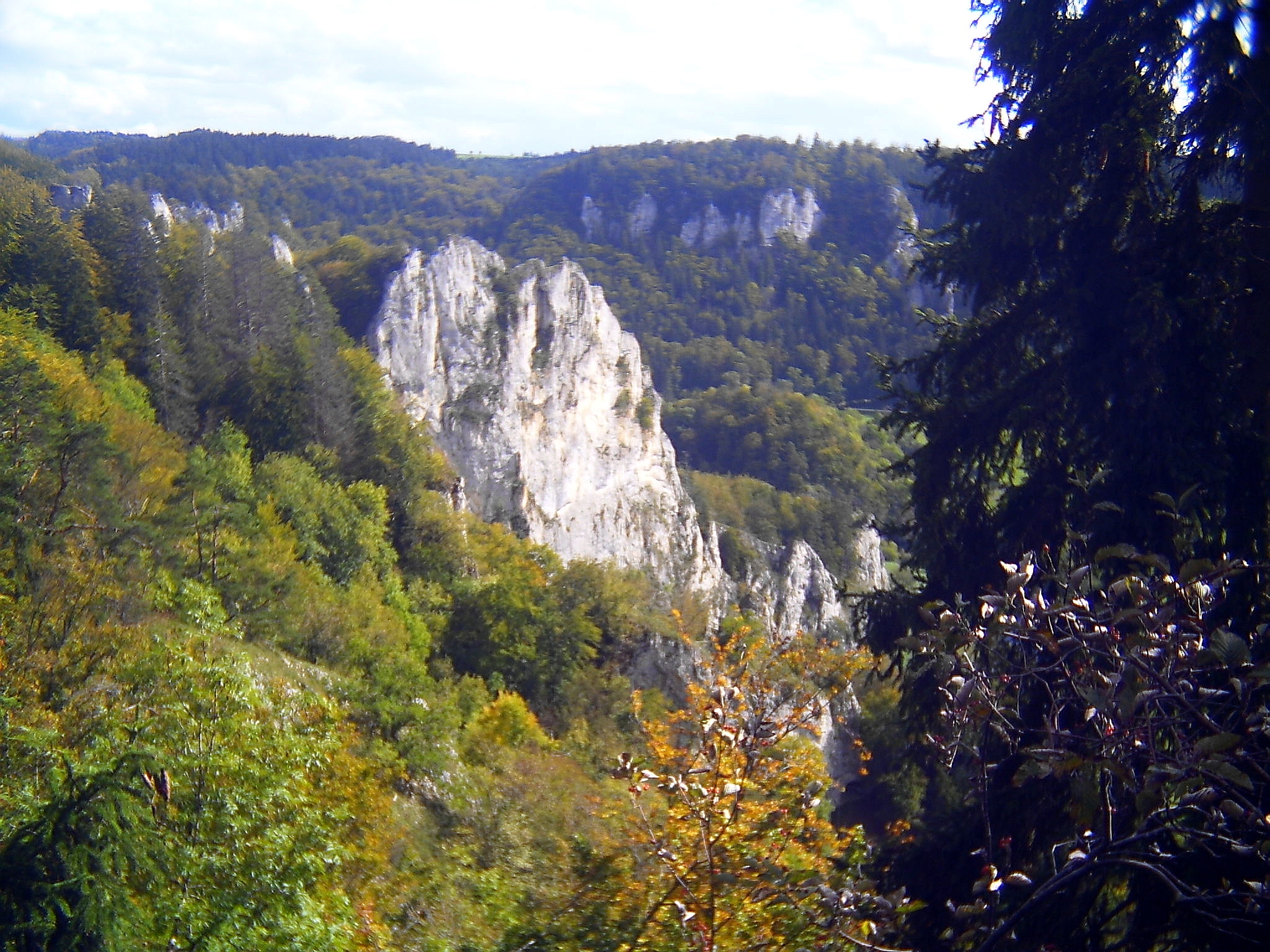 Rock Stiegelefelsen near Fridingen